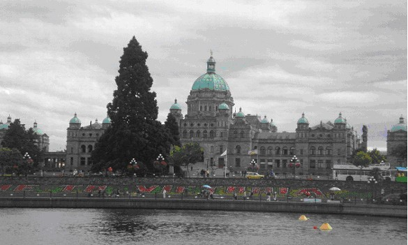 R. Artiachek egindako argazkia.